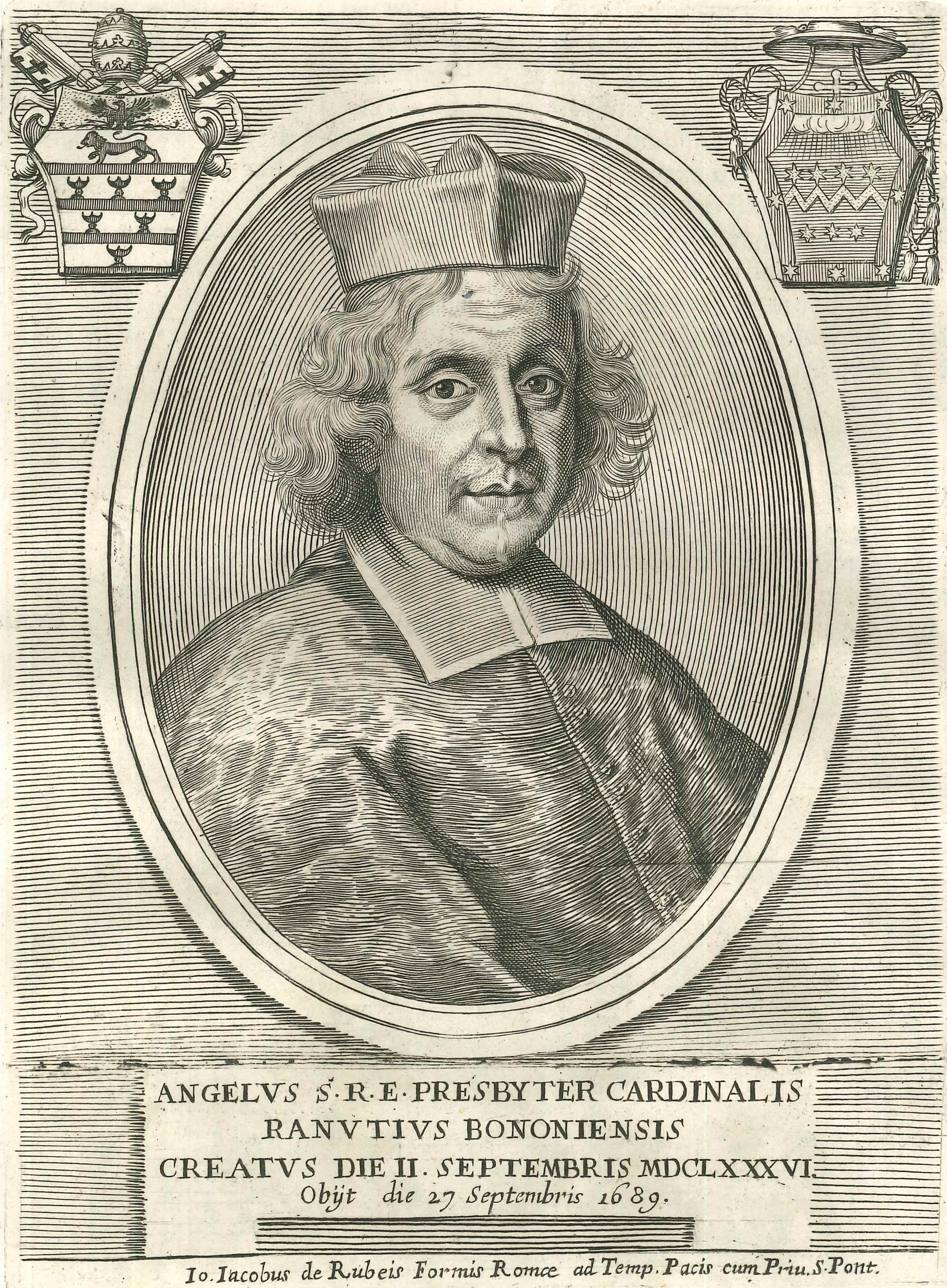 Ritratto del cardinale Angelo Maria Ranuzzi (1626-1689)